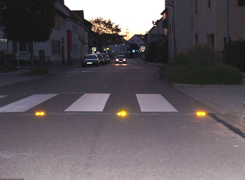 Nachts kommt das gelbe Blinken der Markierungsleuchtknöpfe besonders stark zur Geltung. So werden Fußgänger auch an schlecht ausgeleuchteten Zebrastreifen nicht übersehen.